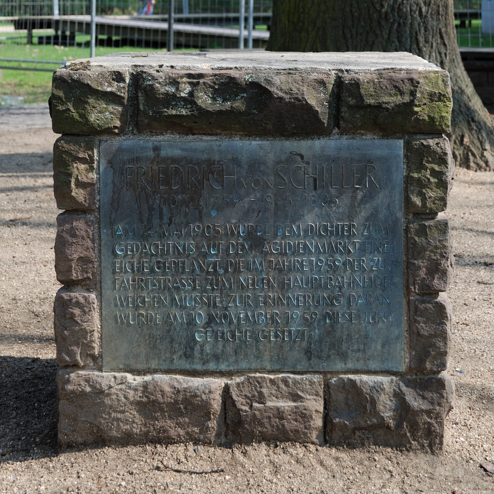 Bronzetafel an der Schillereiche in Braunschweig